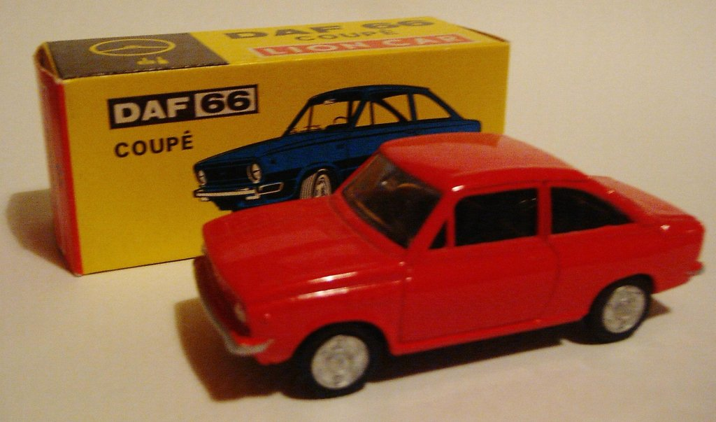 Lion Toys DAF 66 Coupé met originele doos.